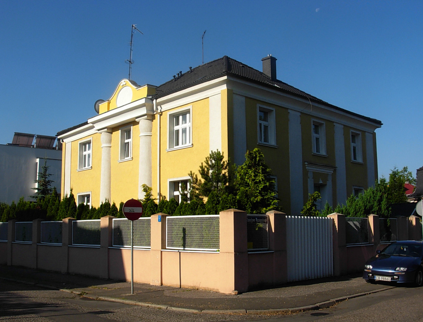 Willa ul. Stanisława Wyspiańskiego 10 na terenie osiedla Sielanka w Bydgoszczy – zbud. 1927-1930, budowniczy Józef Grodzki